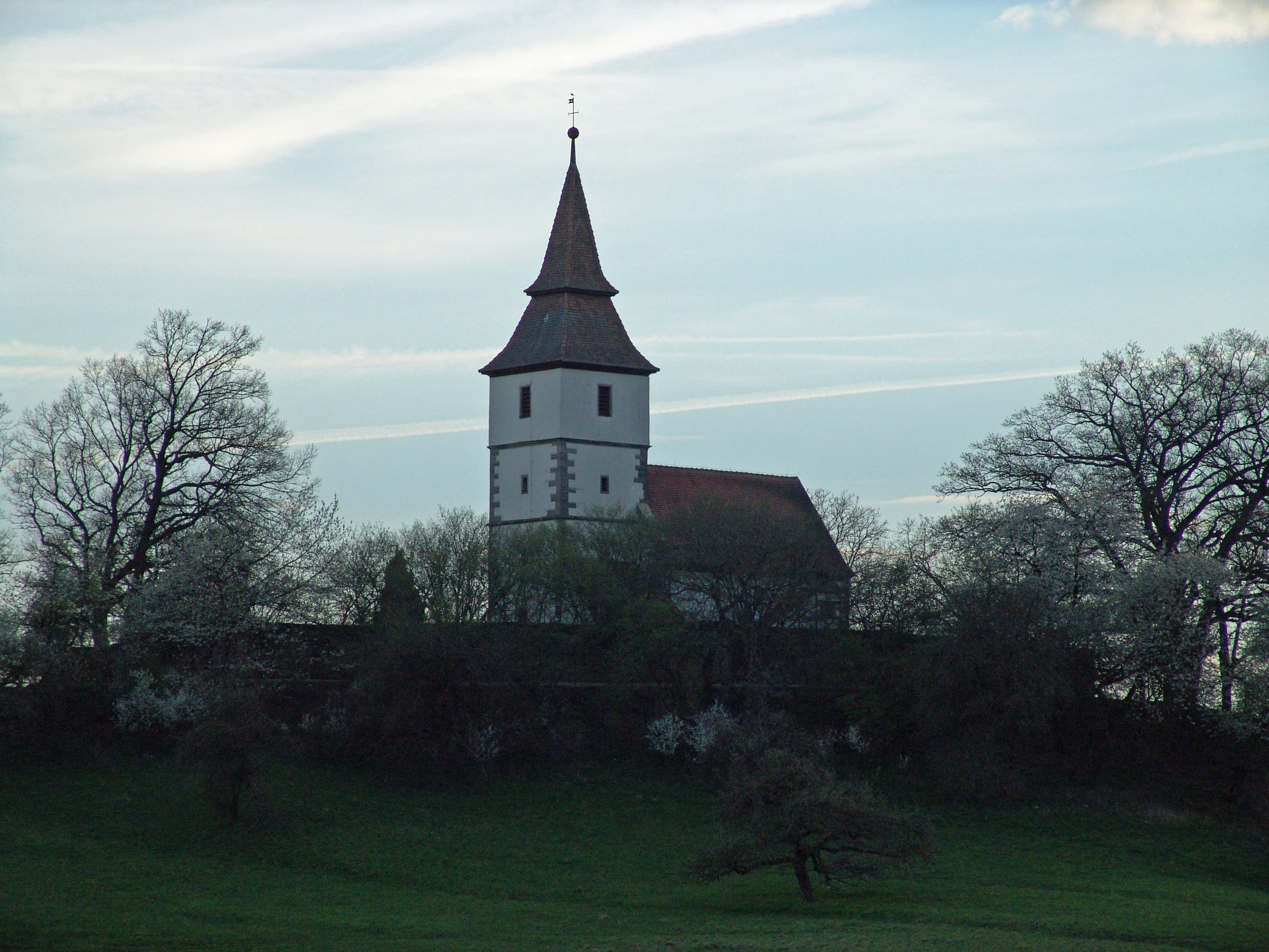 evang.-luth. Kirche St. Veit in Dombühl